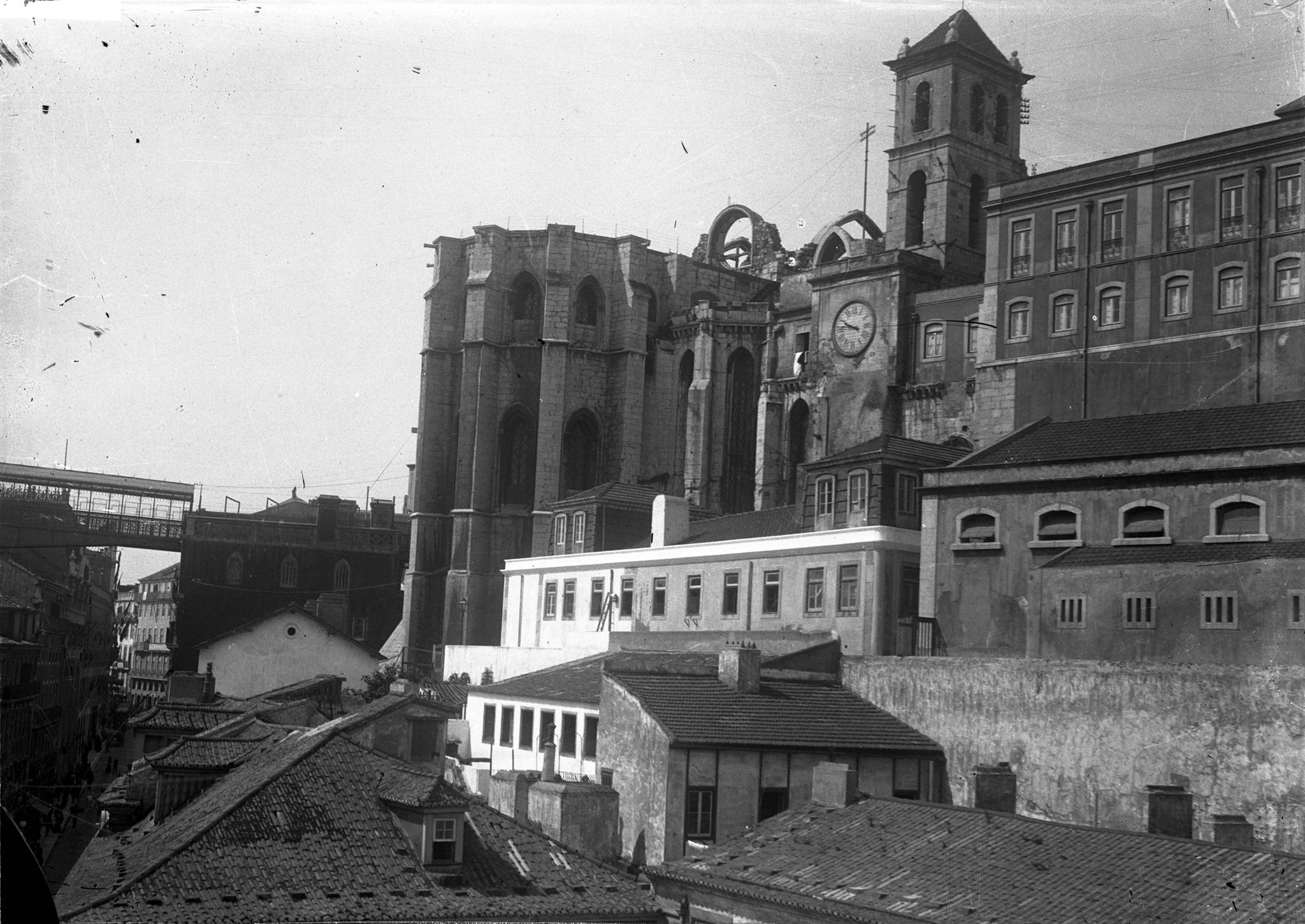 Título: Convento do Carmo. À esquerda, a ponte do elevador de Santa Justa Dimensão: 9 x 12 cm Suporte: Negativo de gelatina e prata em vidro Notas: Inscrição no original: 6419, R21 Assunto: Relógio de rua / Convento do Carmo de Lisboa / Panorâmica Código de referência: PT/AMLSB/BAR/000284